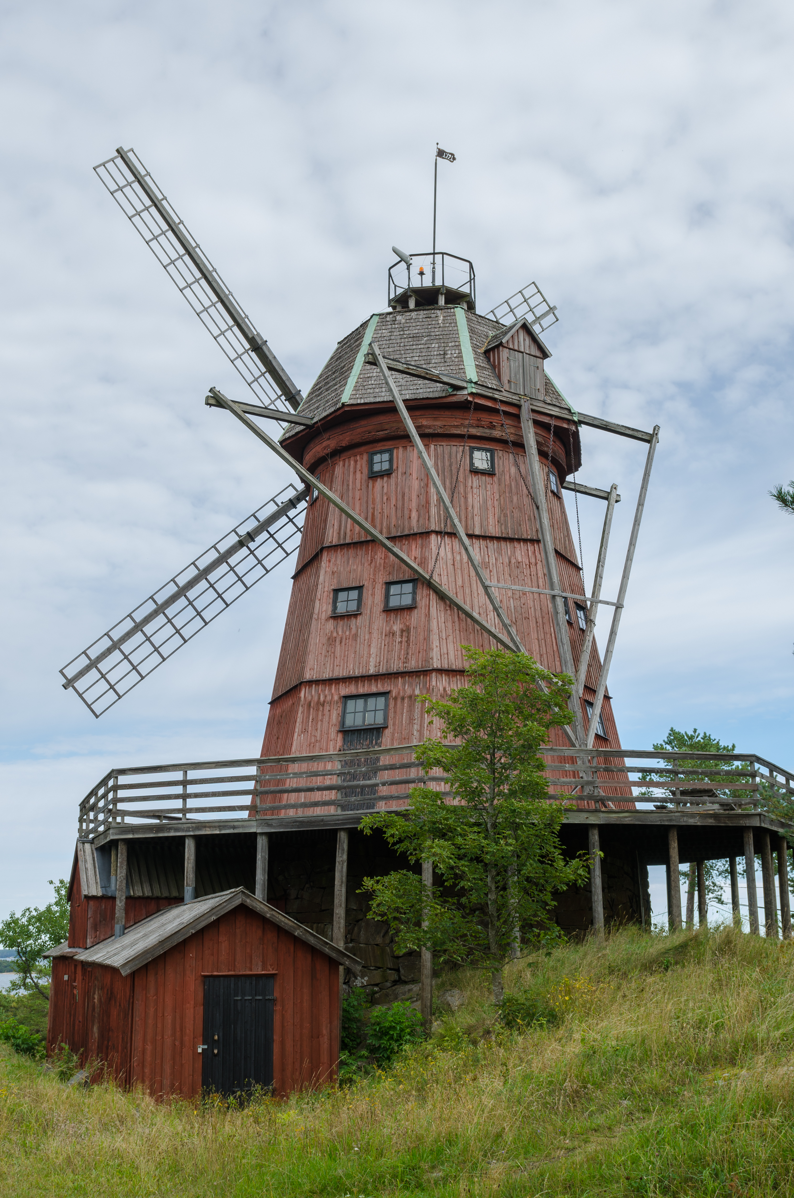 Utö kvarn (mill), Utö island, Haninge Municipality, Stockholm archipelago.